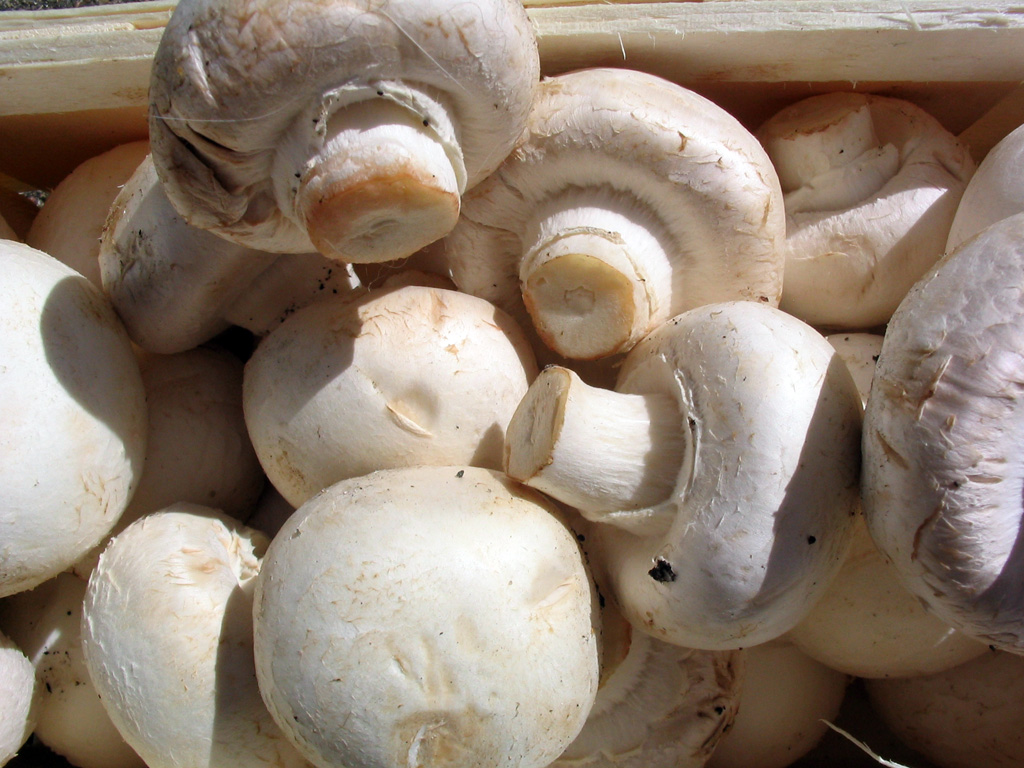 Beschreibung: Zuchtchampignon (Agaricus bisporus) Fotograf: Darkone, 8. September 2004